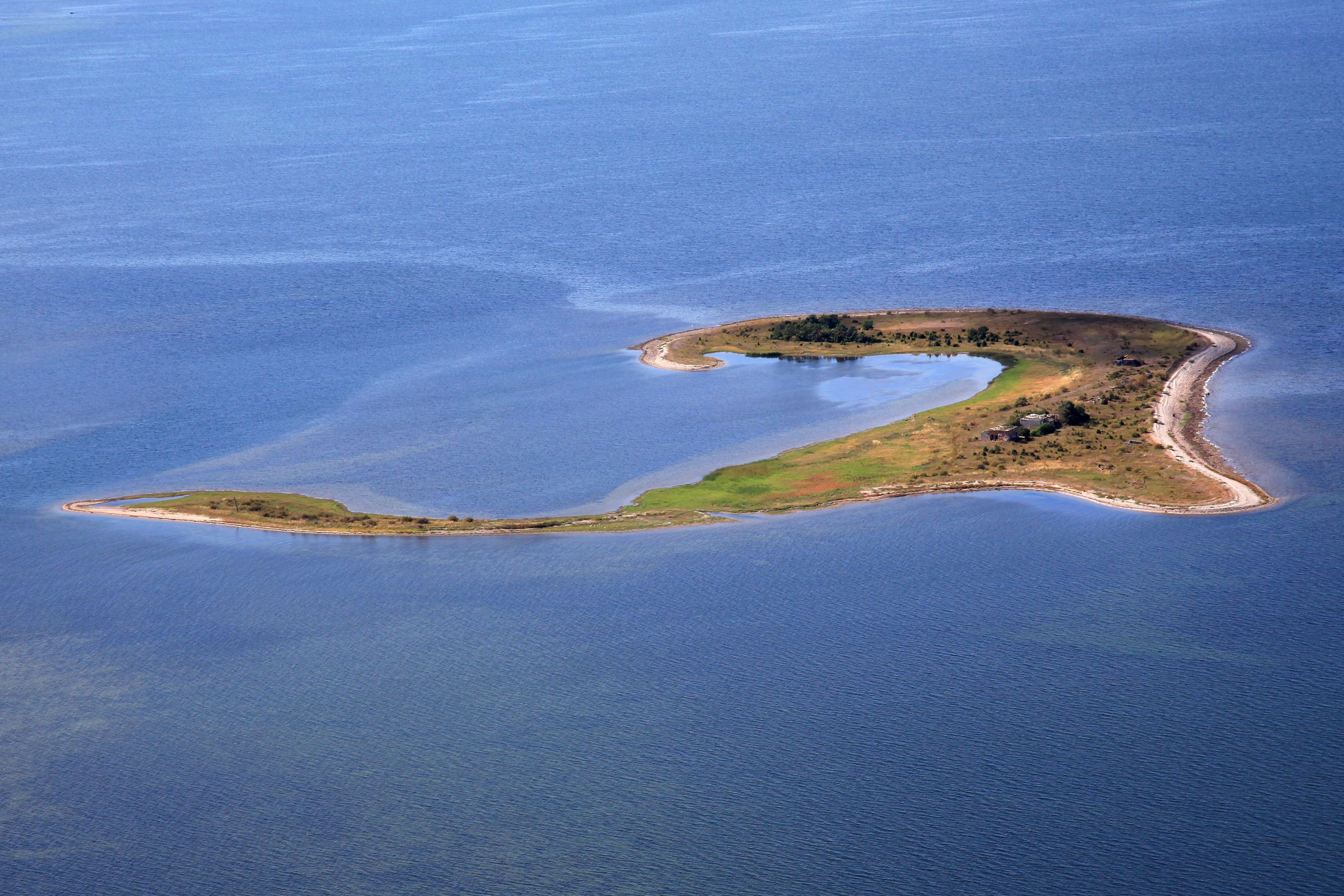 Pihlalaid